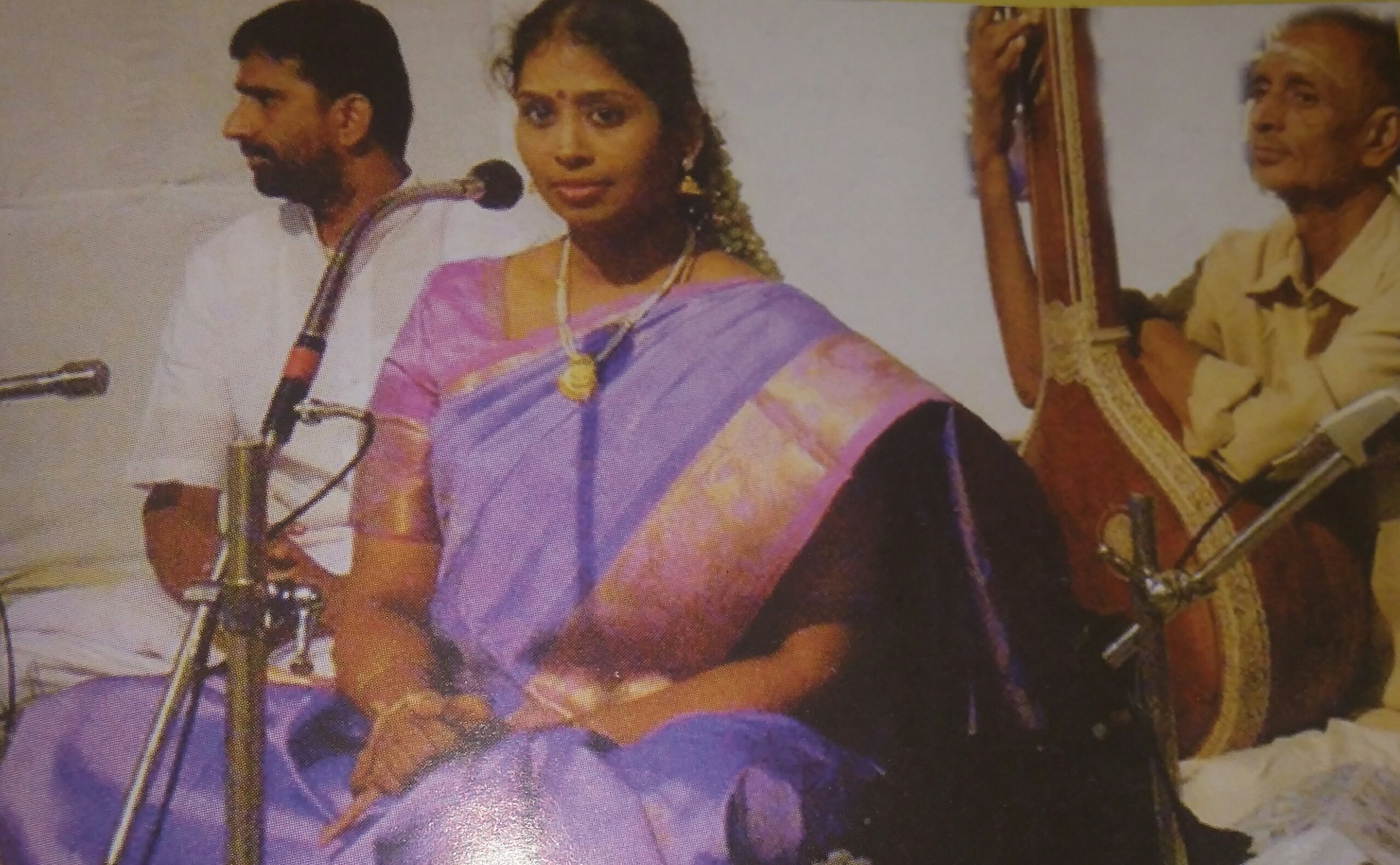 2011ம் ஆண்டு இசைப்பாடகி நித்தியஸ்ரீ மகாதேவா சிட்டிவேரத்தில்